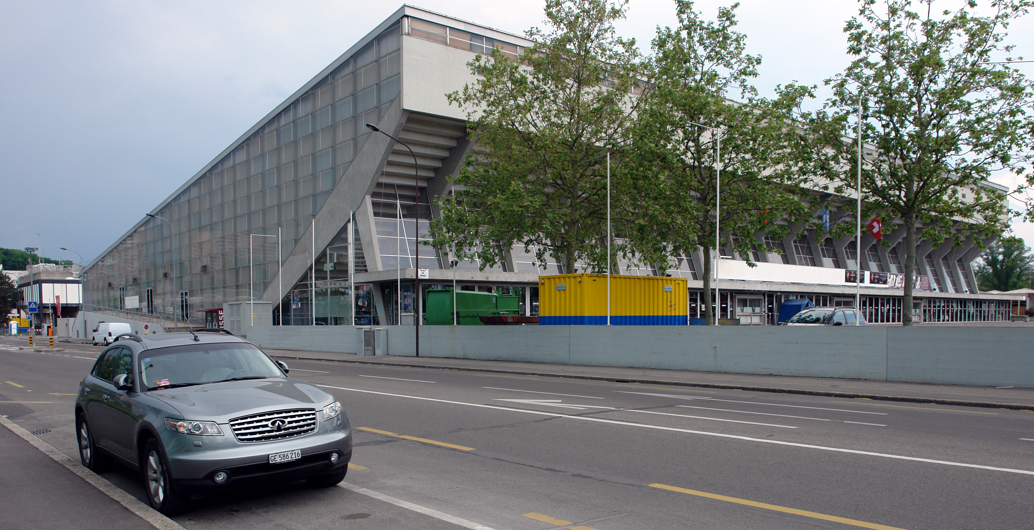 Les Vernets in Geneva, Switzerland, Ice Stadium Architect: Cingria+Maurice, Year: 1958-66